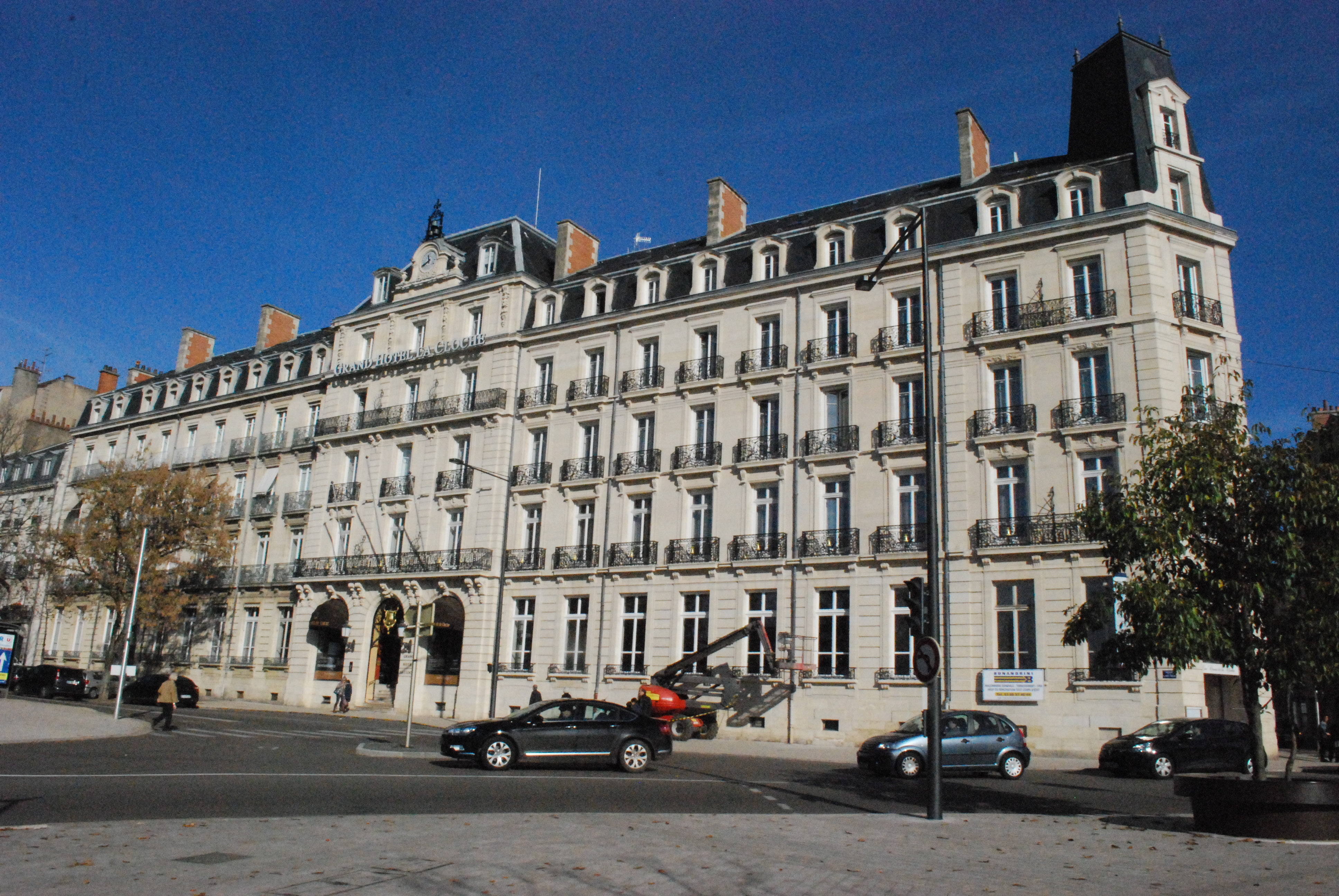 Vue de Dijon.